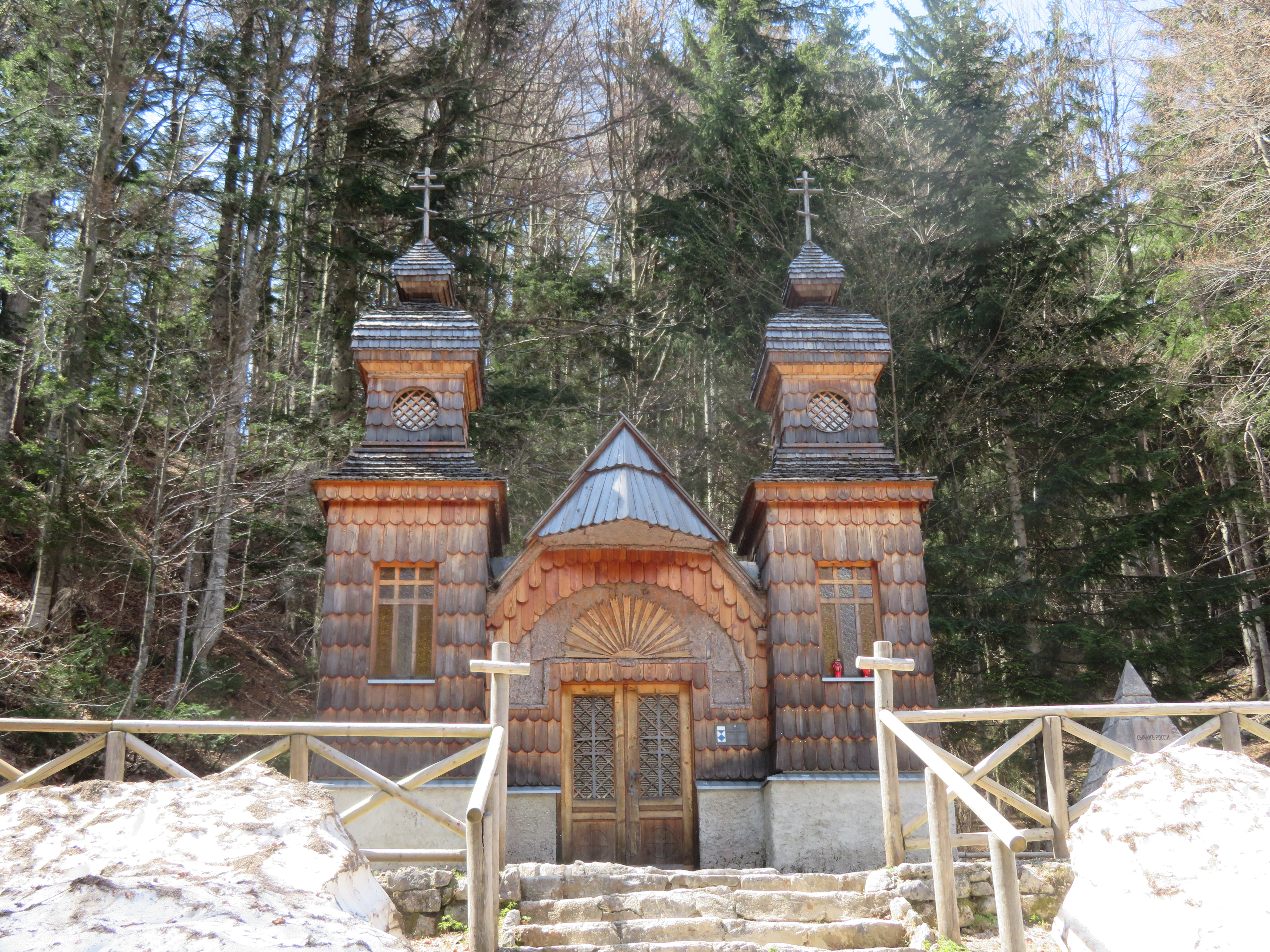 La cappella russa è una cappella costruita in memoria dei soldati russi caduti prigionieri e morti durante la costruzione della strada attraverso il valico di Vršič . La cappella è decorata in uno stile ortodosso e esprime la fede dei soldati che sono morti qui. Fu costruita nel 1916 ed è anche la tomba di questi soldati. Il monumento sulla tomba ha la forma di una piramide con l'iscrizione in russo: "I figli della Russia". Il numero esatto di soldati morti è sconosciuto, si sospetta che durante la costruzione della strada siano morti da 170 a 300 soldati russi e da 10 a 80 austriaci. Solo l'8 marzo 1916, 110 soldati russi e 7 guardie austro-ungariche morirono a causa di una valanga. La cappella russa è iscritta nel registro dei beni culturali della Slovenia come monumento culturale di importanza locale.